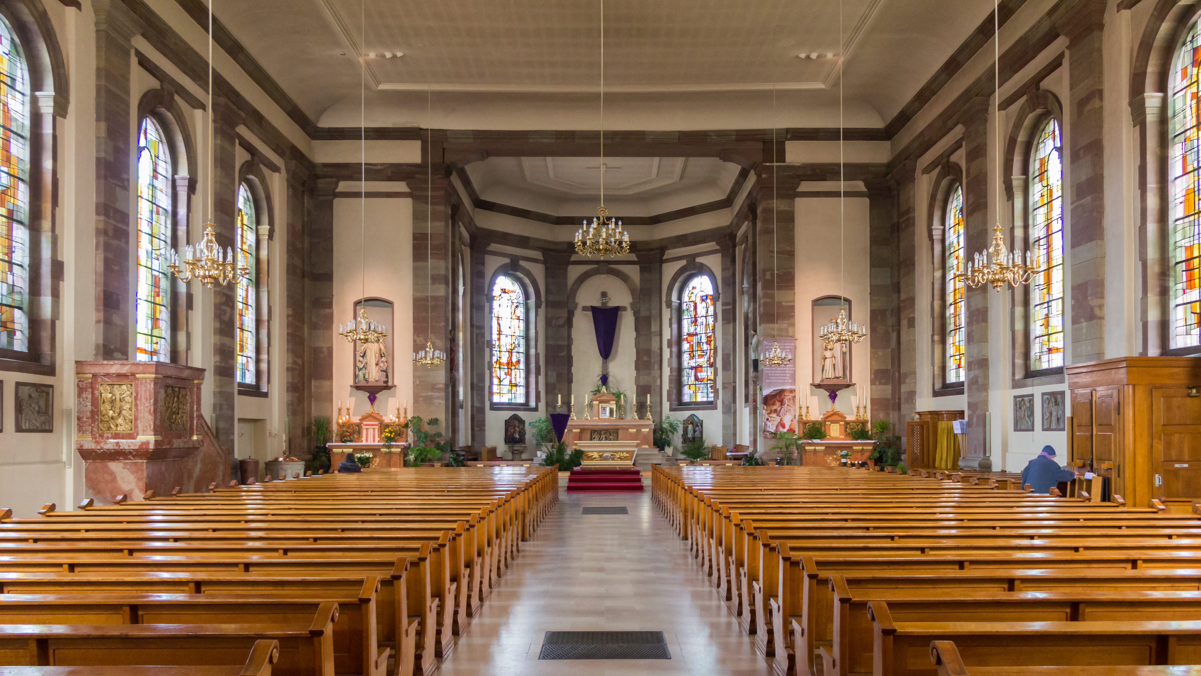 Église Sainte-Catherine de Bitche